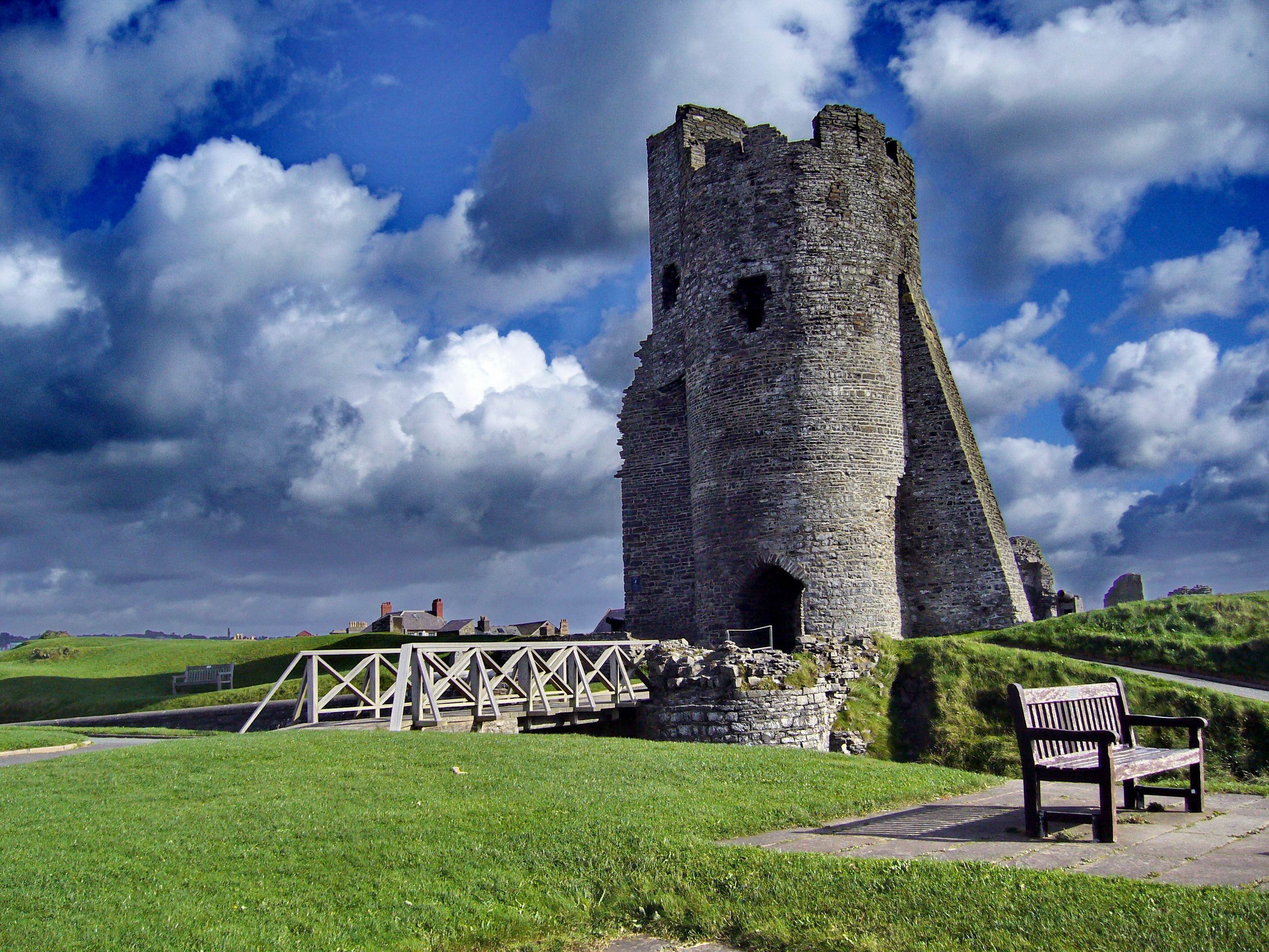 Aberystwyth